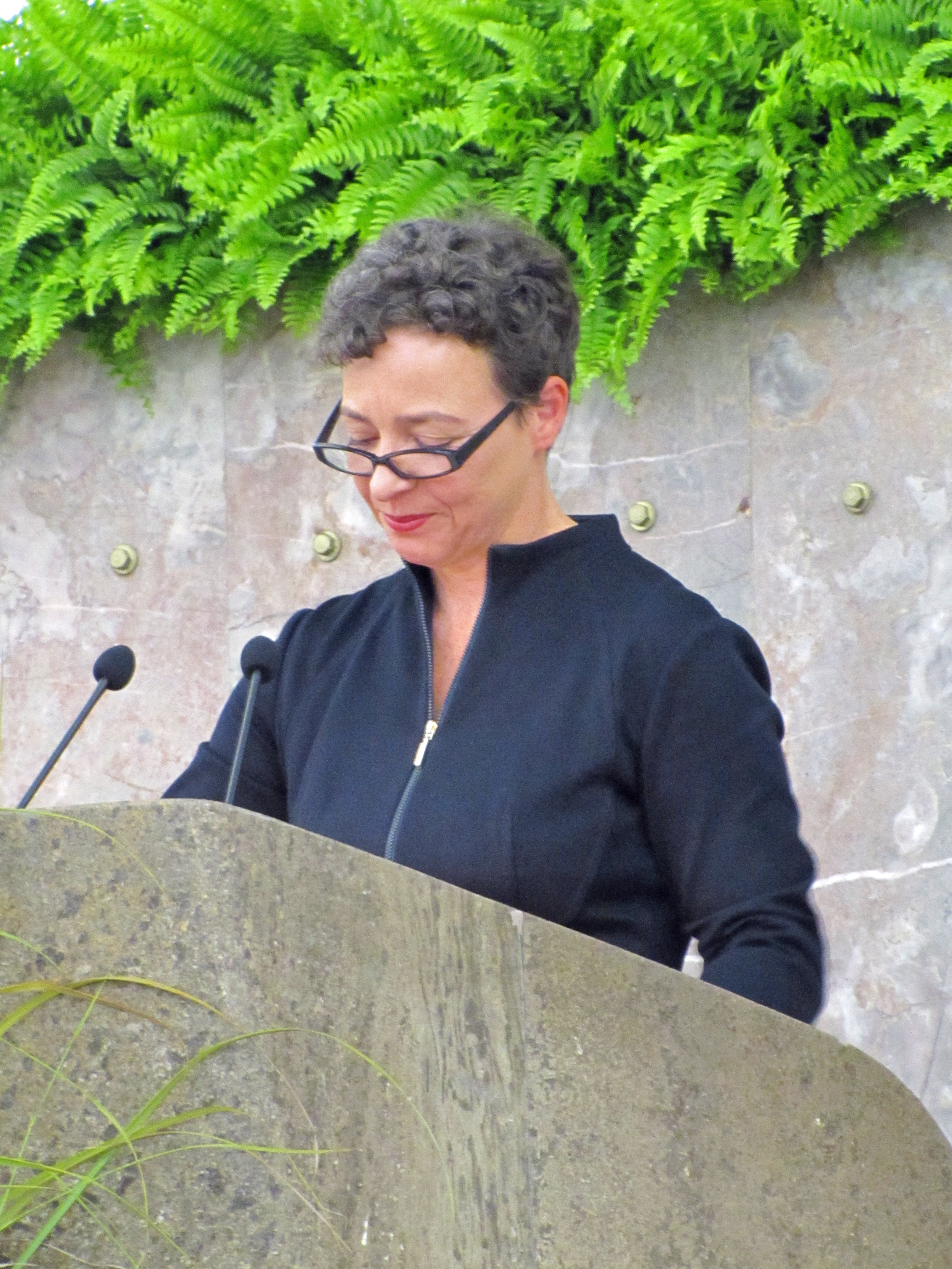 Adorno-Preis 2012. Eva Geulen bei ihrer Ladatio auf Judith Butler, in der Frankfurter Paulskirche.